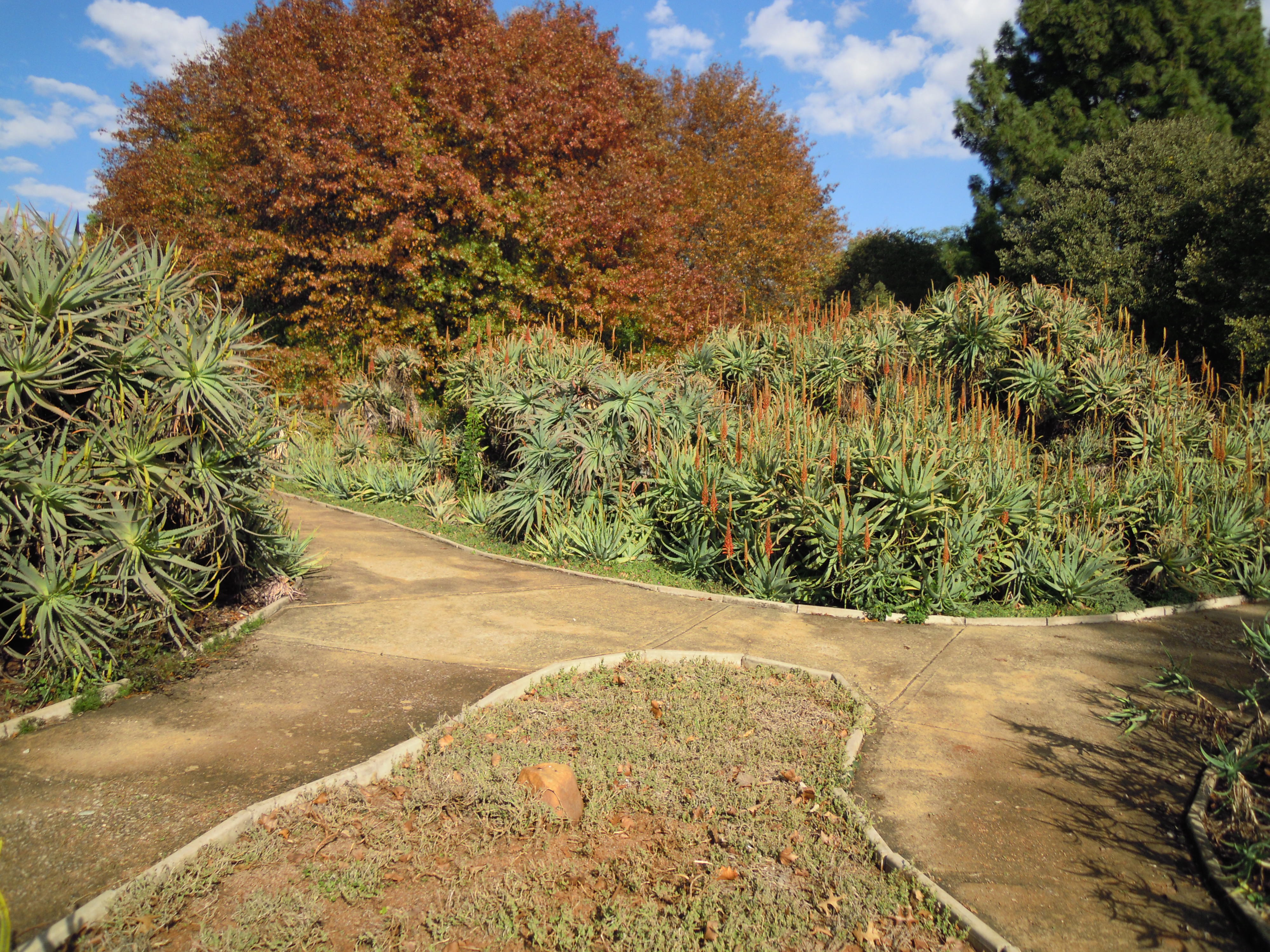 Aloe arborescens in succulent garden at Johannesburg Botanical Gardens